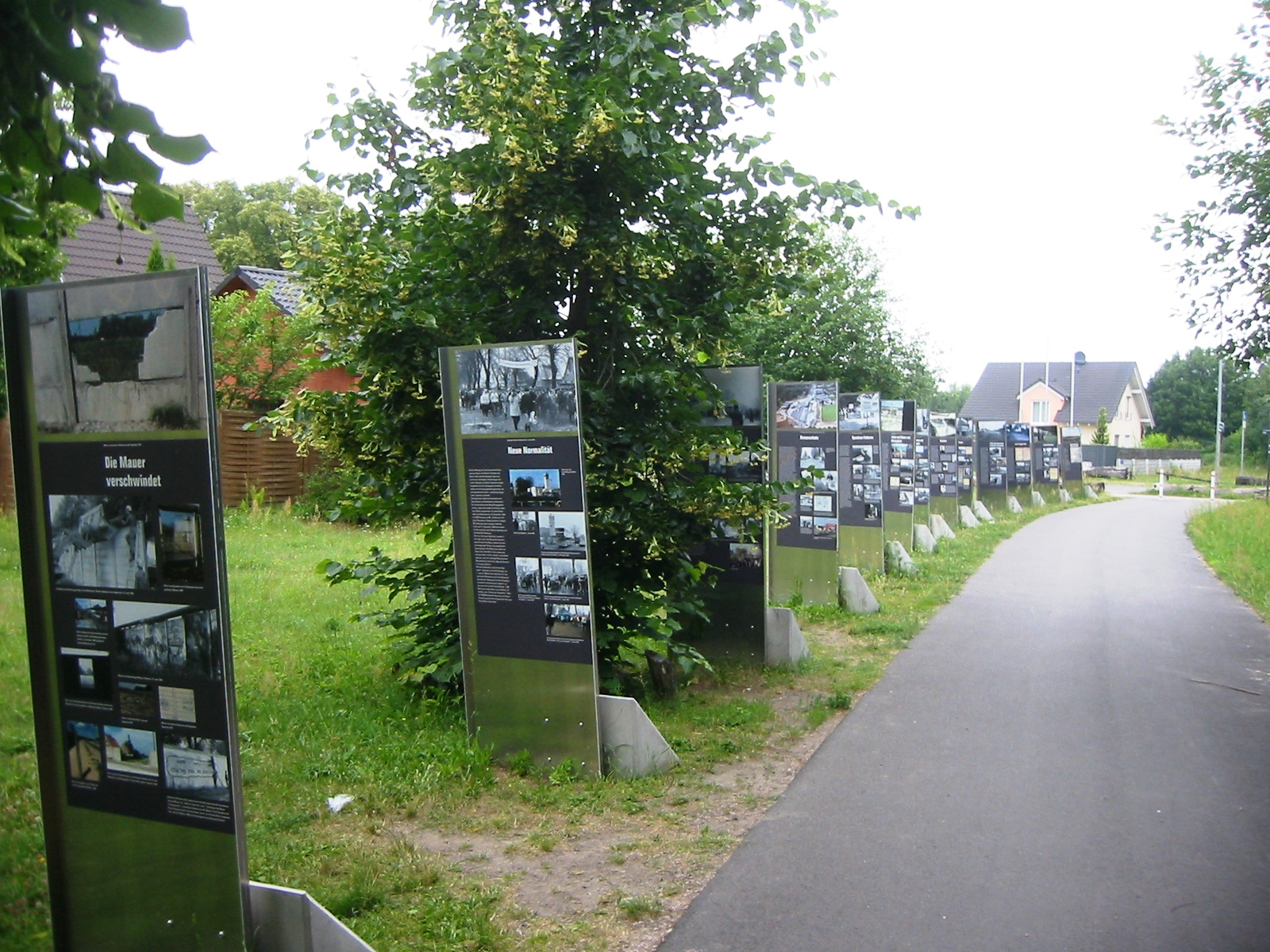 Informationssäulen am Finkenkruger Weg in Berlin-Staaken. Die Aufnahmen zeigen Fotos zur Zeit der Deutschen Teilung. Abgebildet sind unter anderem Menschen, die an der Grenze zu Tode kamen.